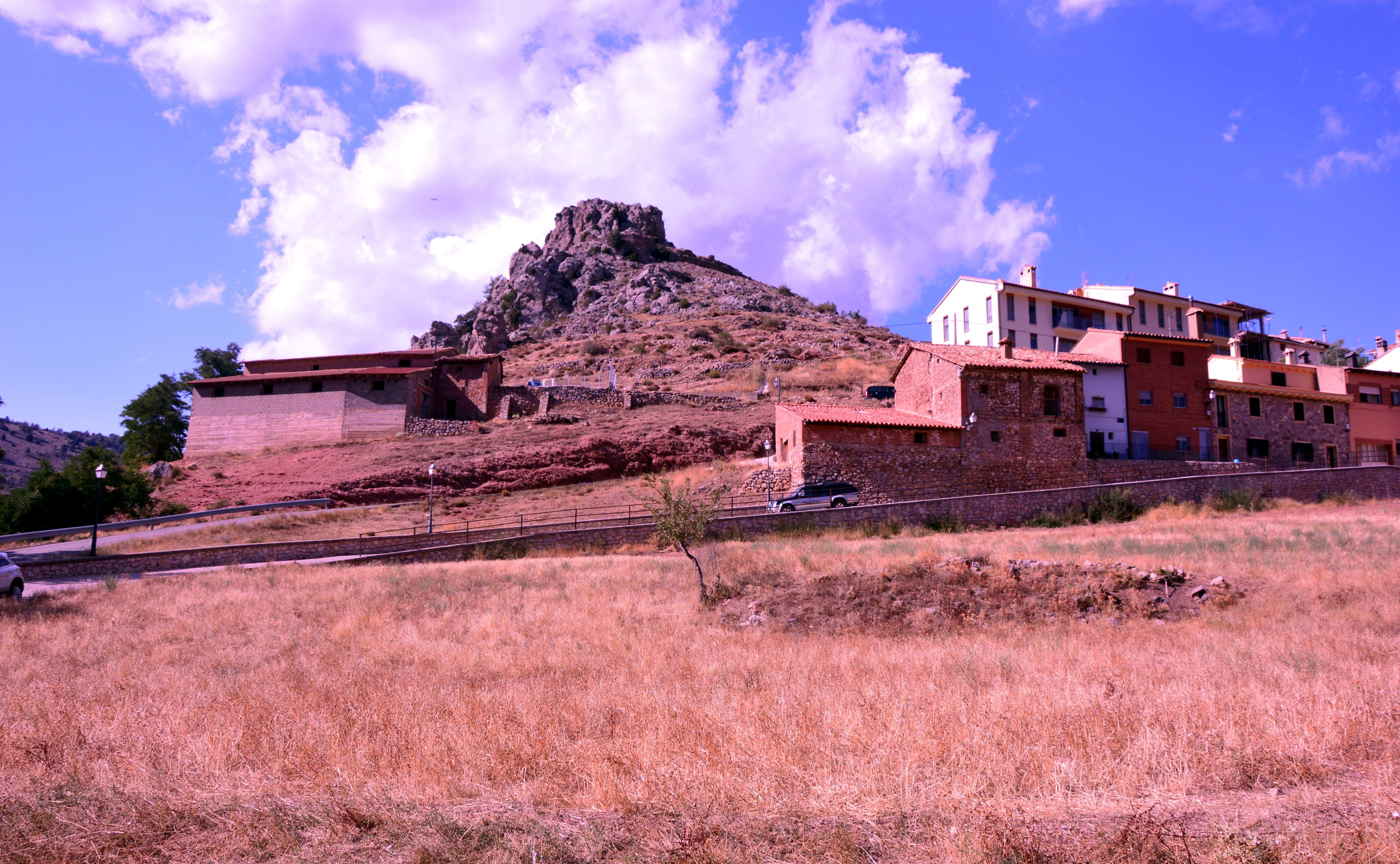 Vista general (suroriental) del cerro del Castillo en Camarena de la Sierra (Teruel), con detalle del caserío (2017).